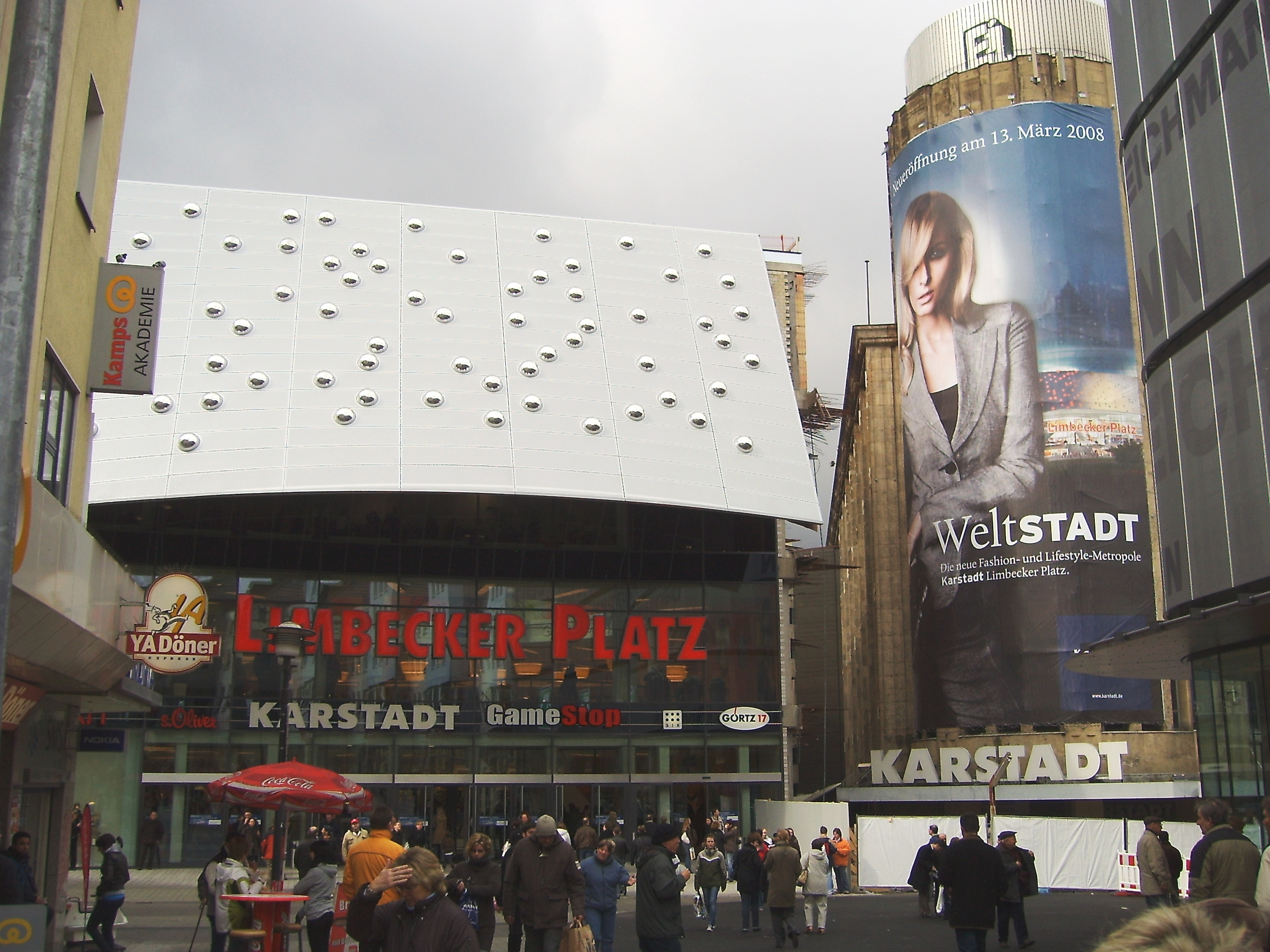 Karstadt Essen, Limbecker Platz, 1 Woche nach Eröffnung, links neues, rechts altes Althoff-Gebäude